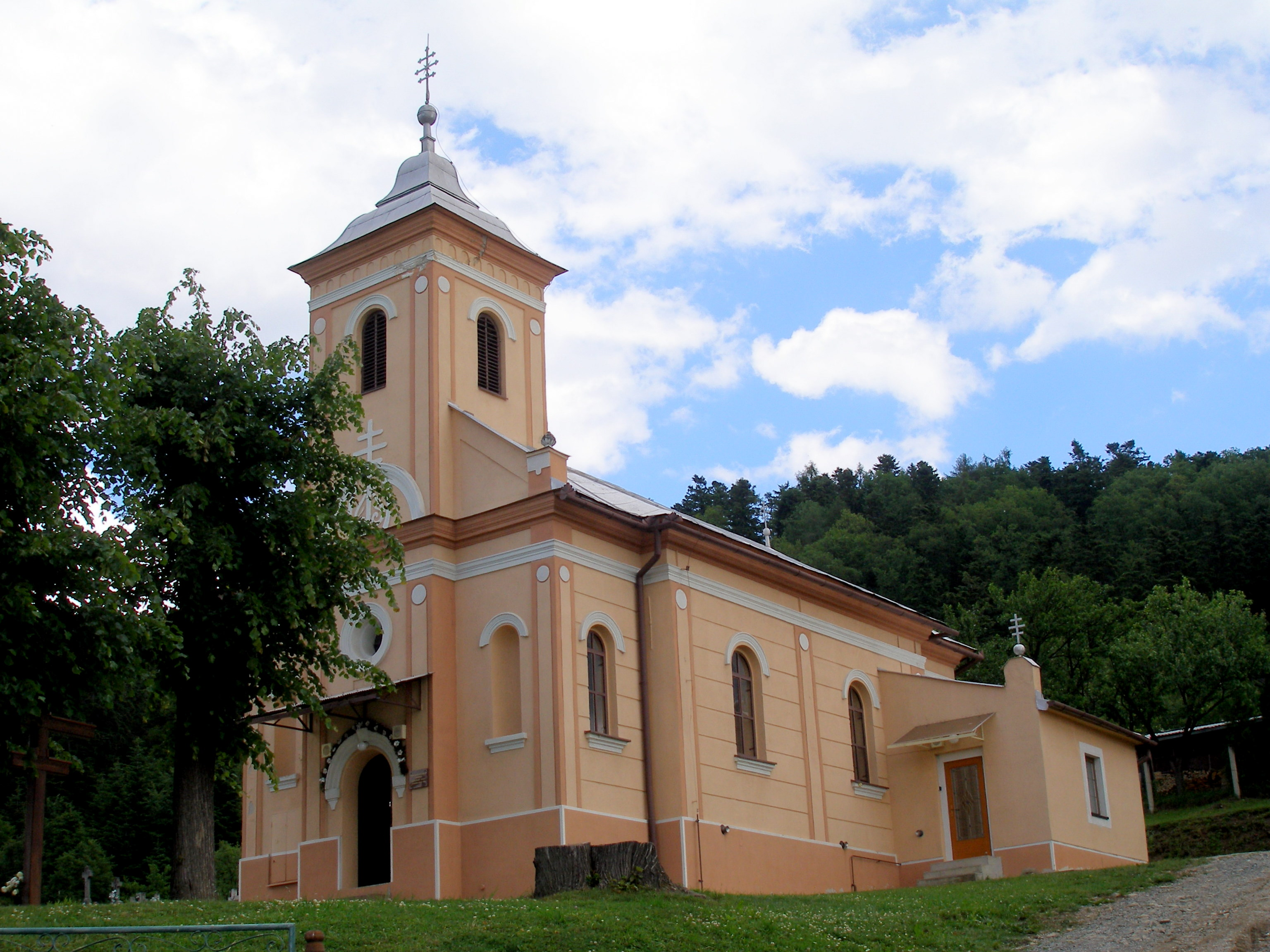 Obec Červená Voda okres Sabinov